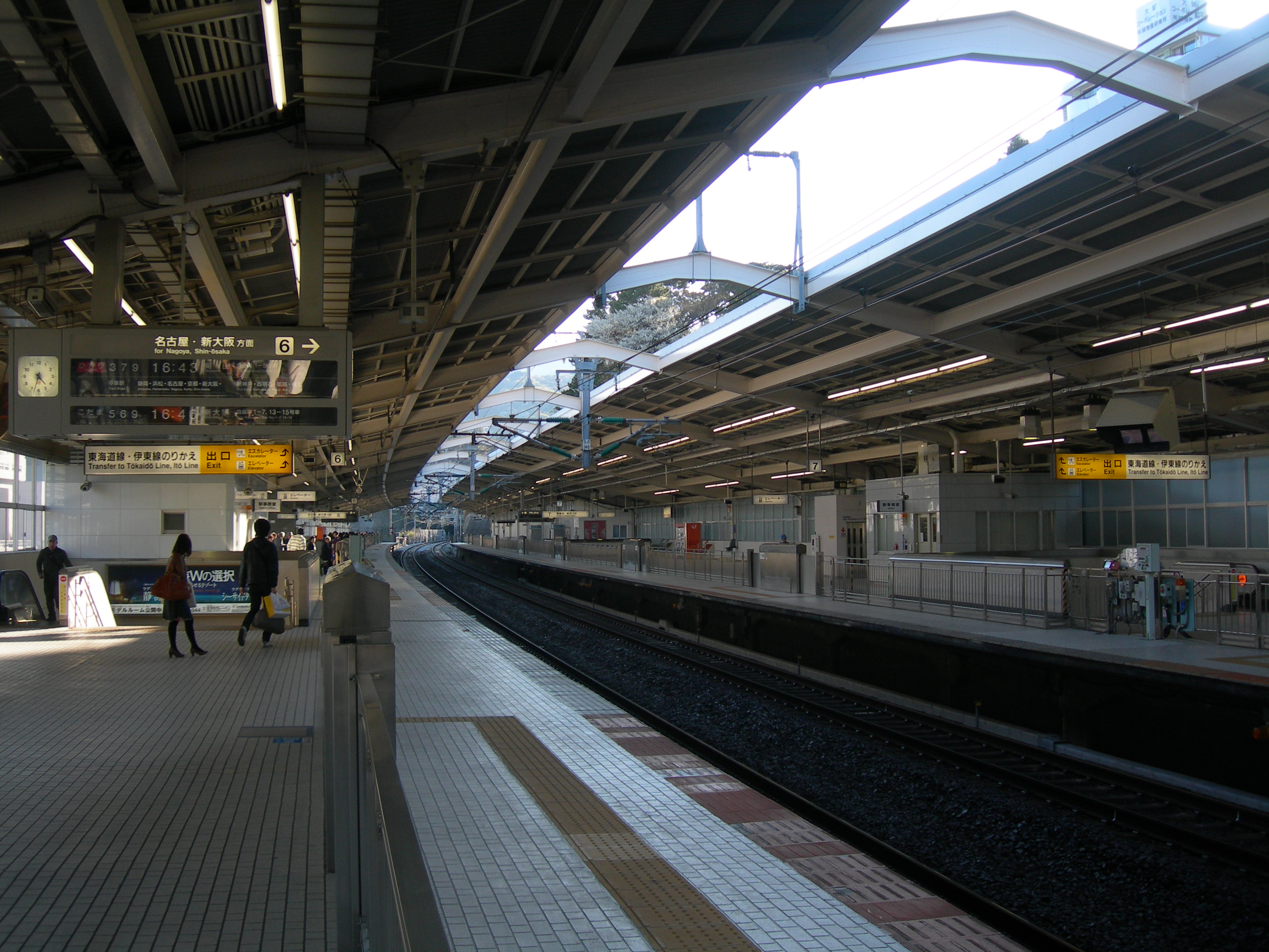 熱海駅新幹線プラットホーム